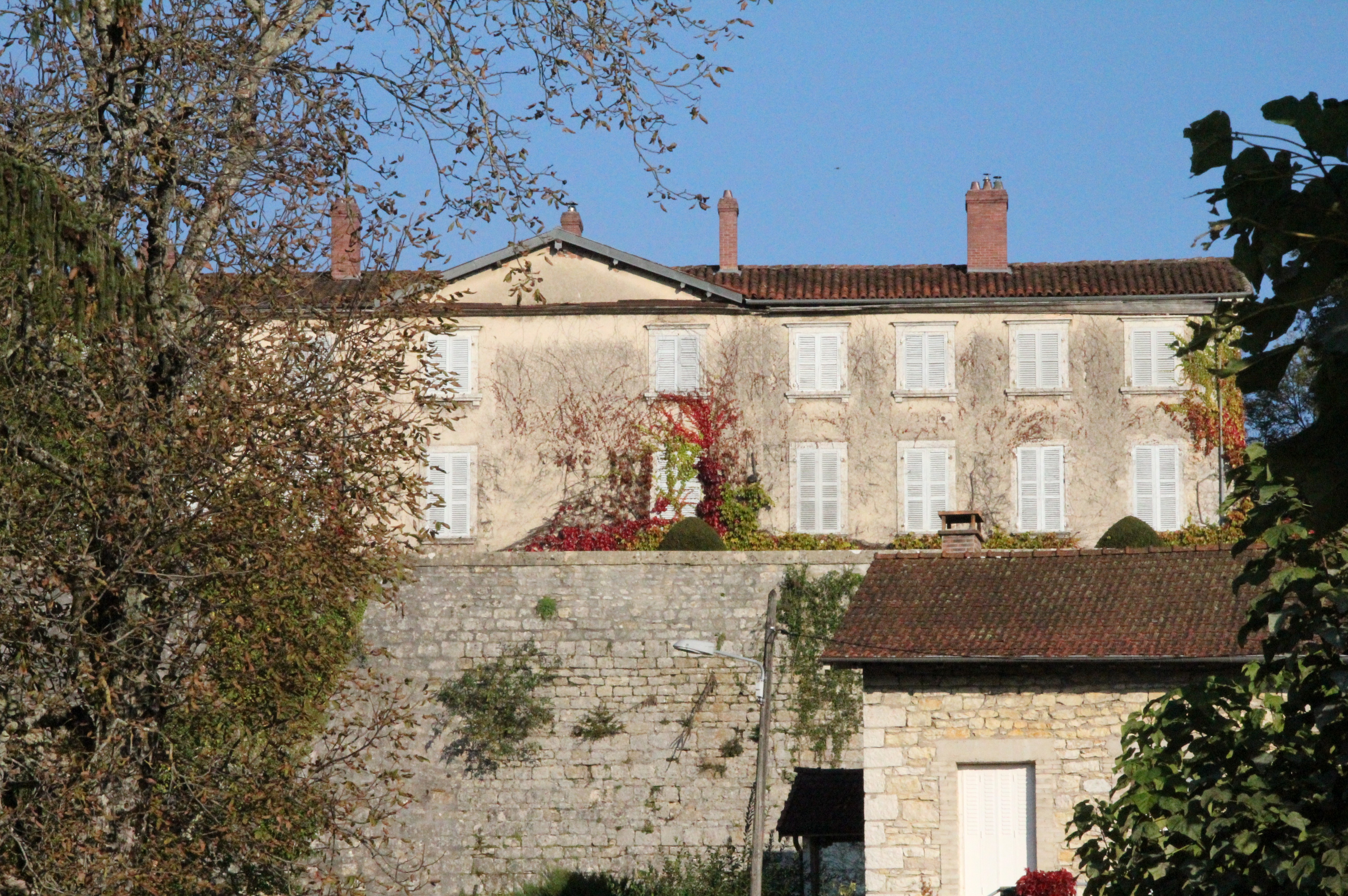 Façade donnant sur le village